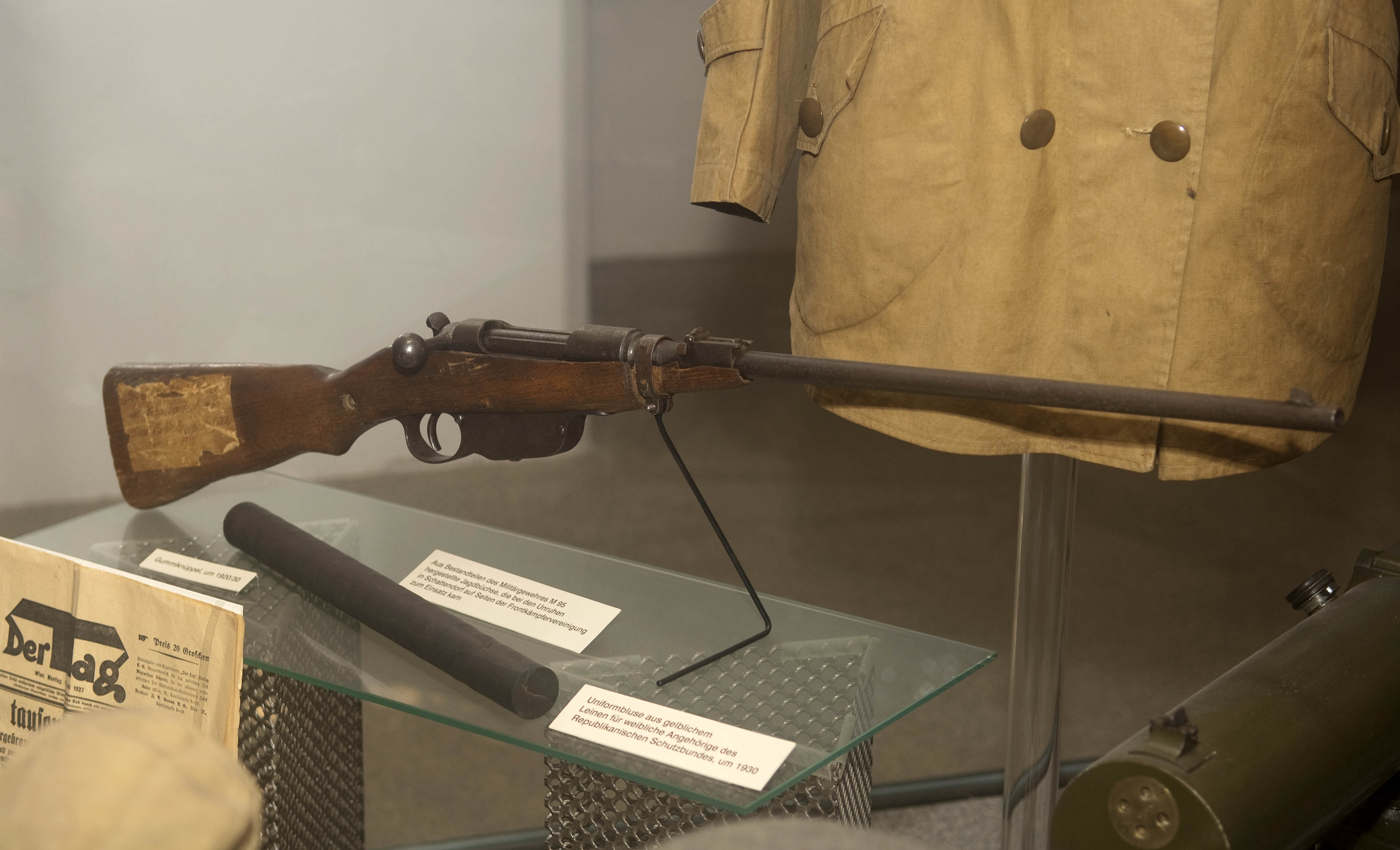 Die Tatwaffe von Schattendorf (30. Jänner 1927) im Heeresgeschichtlichen Museum in Wien.